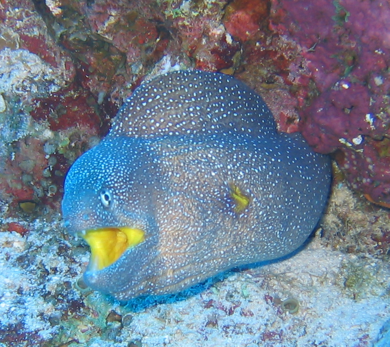 Murène a gueule jaune, Egypte 2006, A. Laydier